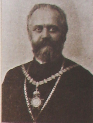 Еміліан_Воюцький.jpg: доктор теології, ректор Чернівецького університету у 1892-1893 та 1901-1902 навчальних роках Еміліан Воюцький